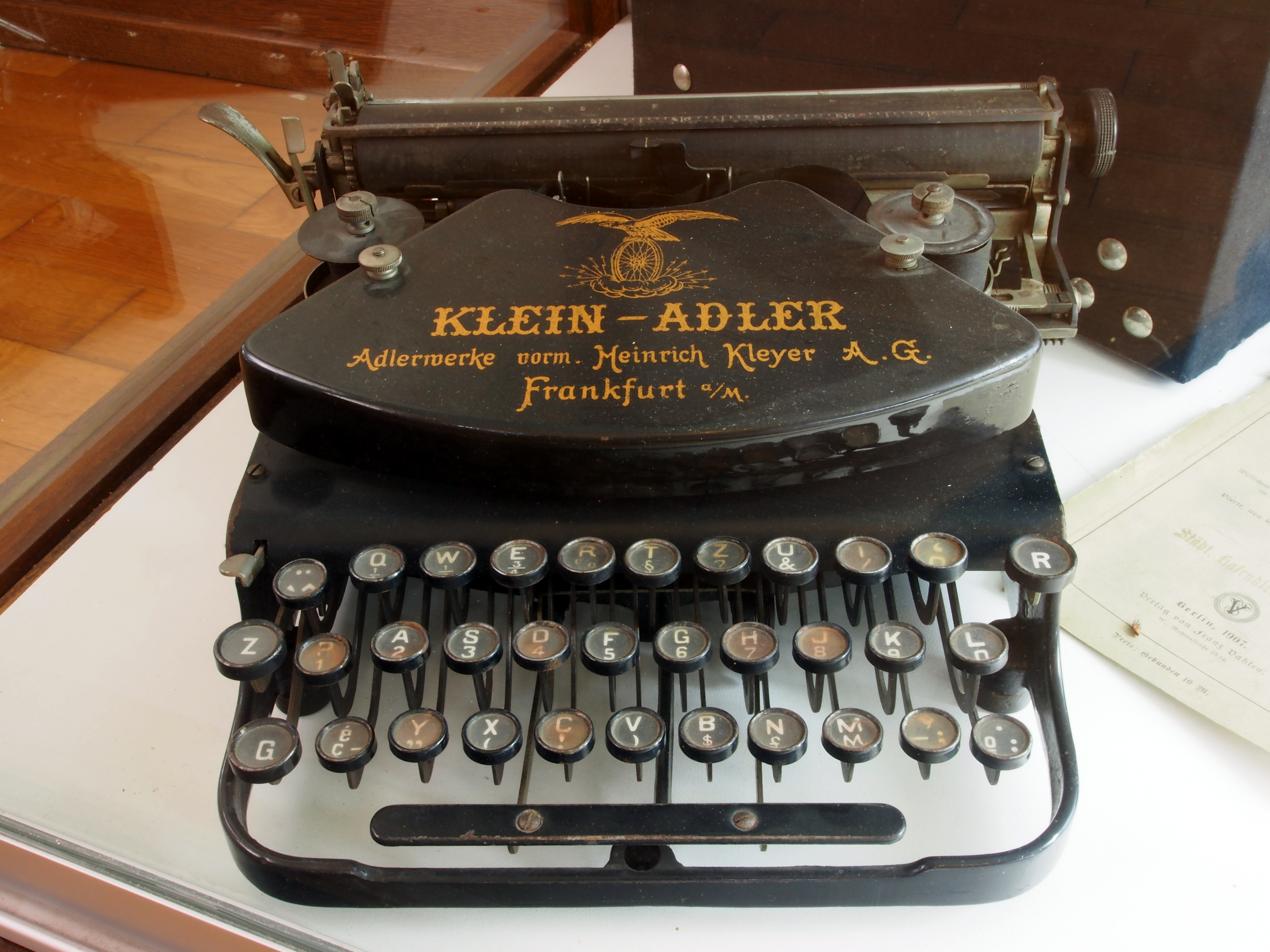 Museum Wilhelmsbau Klein-Adler typewriter